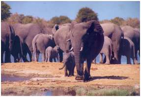 Elephant, Etosha Park